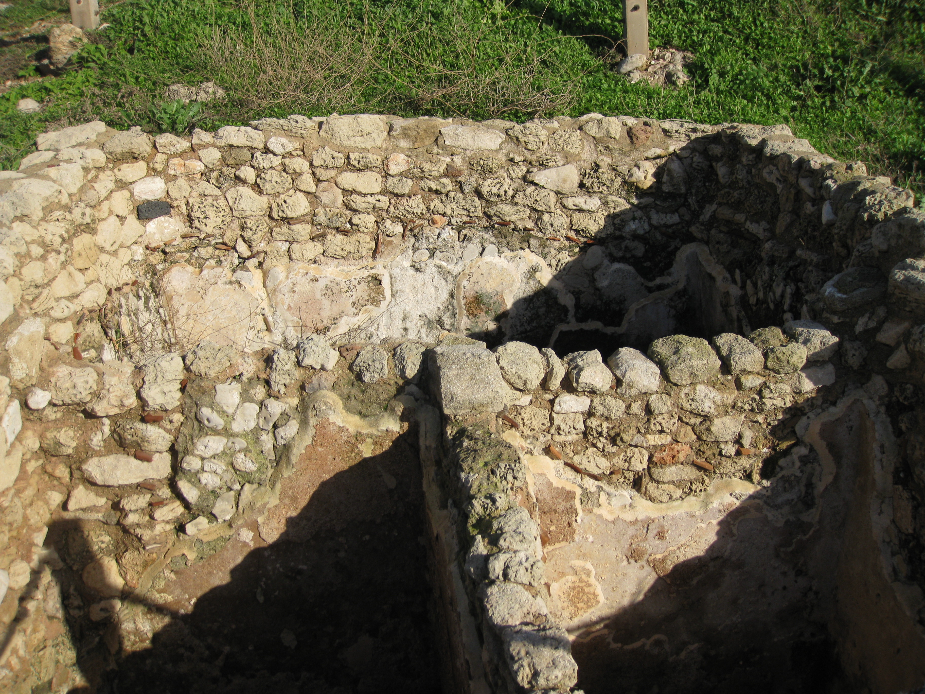 Apollonia Byzantine Water Reservoirs מאגרי מים מהתקופה הביזנטית גן לאומי אפולוניה (ארסוף)